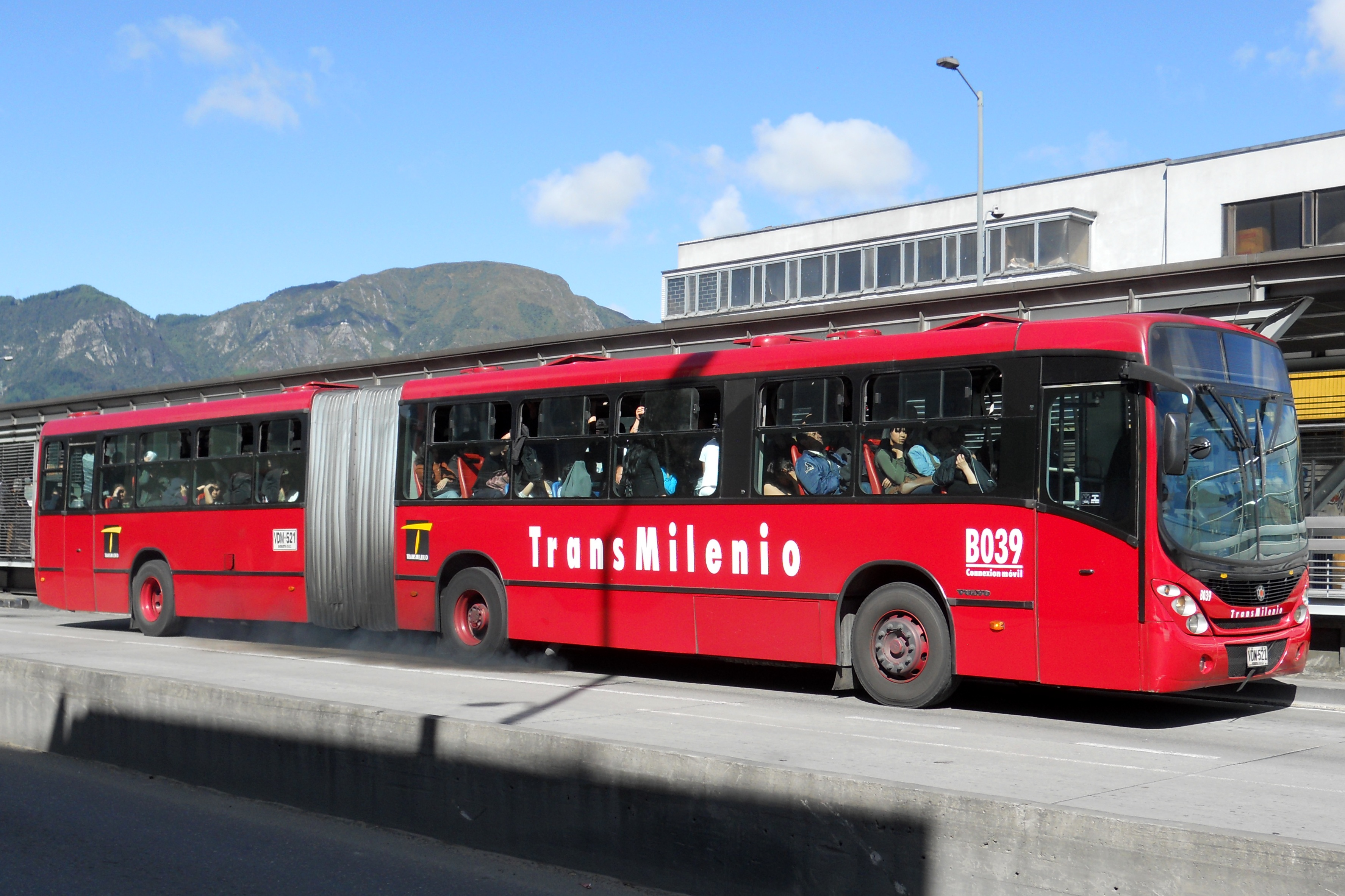 Estación de TransMilenio Fucha. Av. Caracas con cl 18 sur.